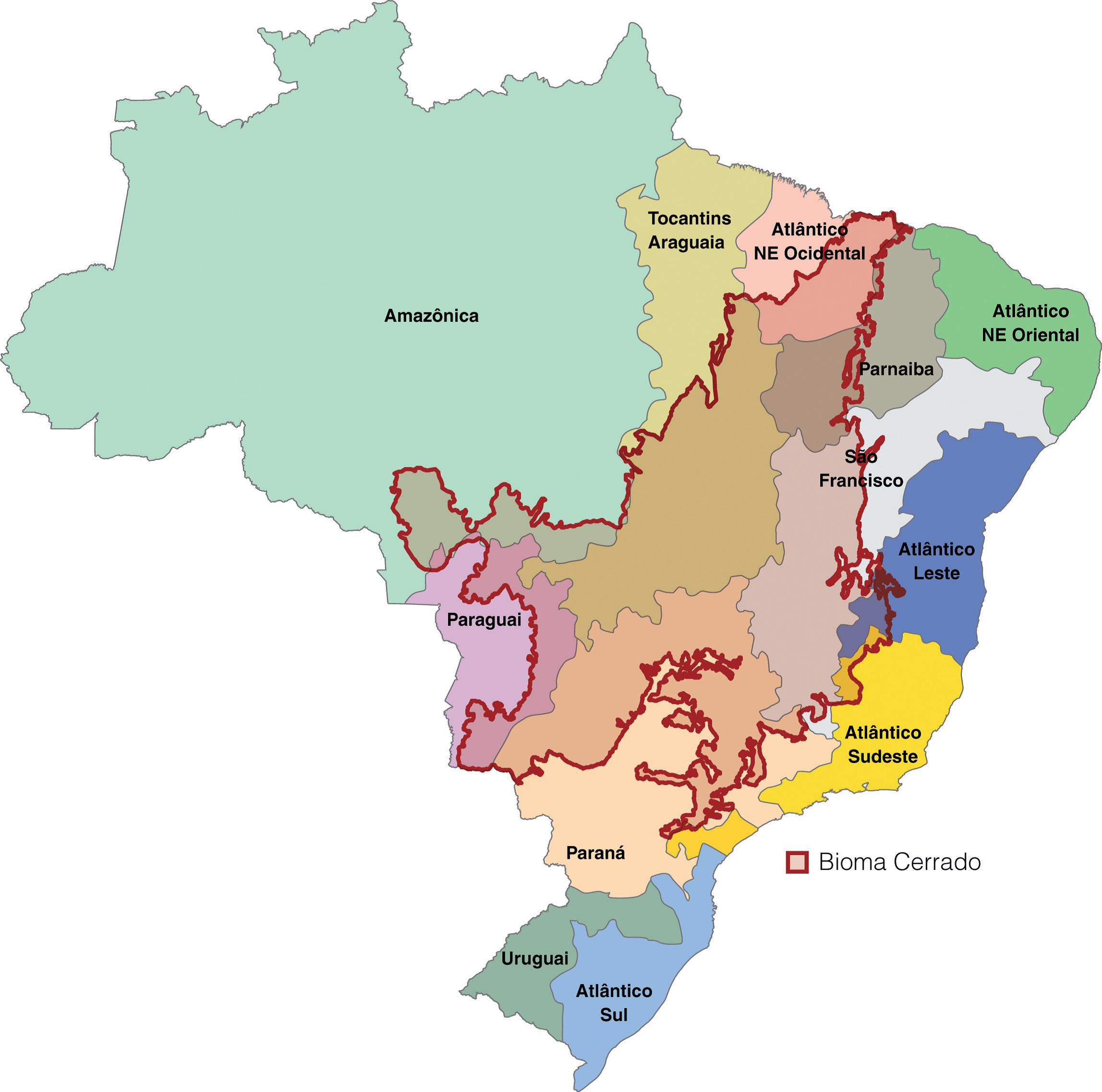 Hidrografia do Cerrado